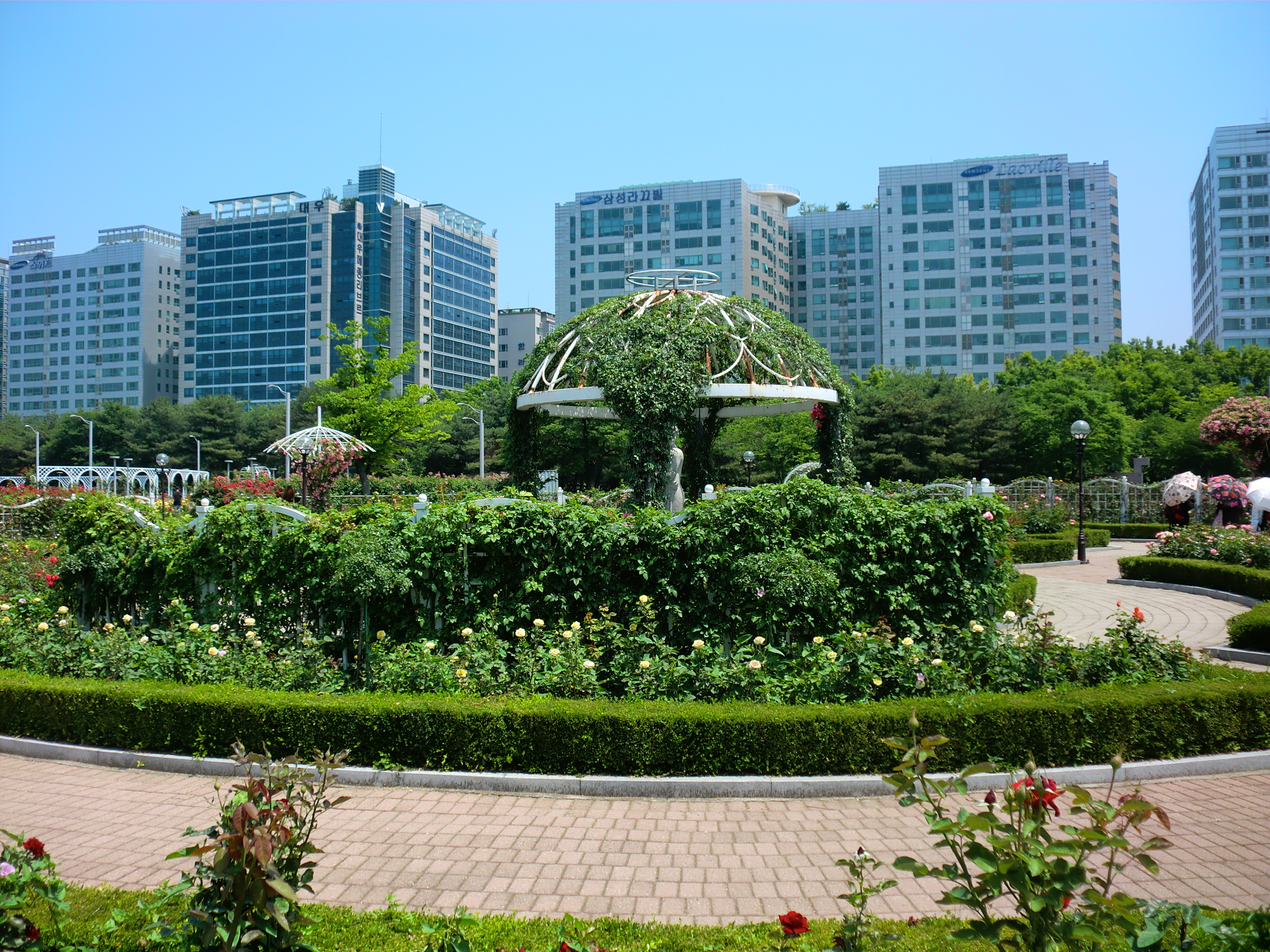 2014 고양호수장미페스티벌